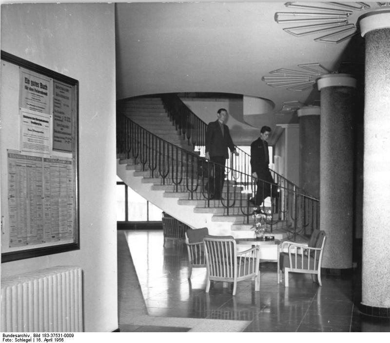 Freiberg, Bergakademie, Chemisches Institut, Vorraum Zentralbild Schlegel 16.4.1956 Zi-Th. Zum VIII. Berg- und Hüttenmännischen Tag vom 24. bis 26.5.1956 in Freiberg. Bis jetzt stellte die Regierung für den Neubau der Bergakademie in Freiberg etwa 10 Mill. DM zur Verfügung. Im 2. Fünfjahrplan sind zur Erweiterung 50 Mill. eingeplant. Die Zahl der an der Bergakademie studierenden stieg von 250 im Jahre 1945 auf etwa 2000 im Jahre 1956. Von 1951 bis 1954 wurde das neue Chemische Institut erbaut, wofür die Regierung 7 025.000 DM ausgab. Es ist nach dem bekannten Wissenschaftler "Clemens Winkler" benannt worden. UBz: Der Vorraum des Chemischen Instituts.